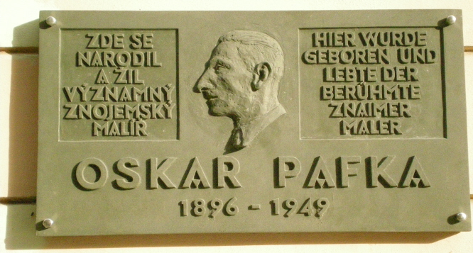 Gedenktafel für Oskar Pafka in Znaim.